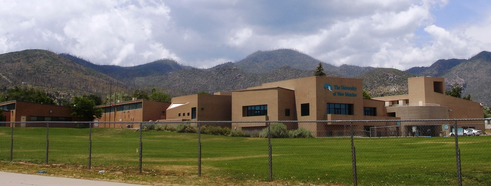 UNM at Los Alamos